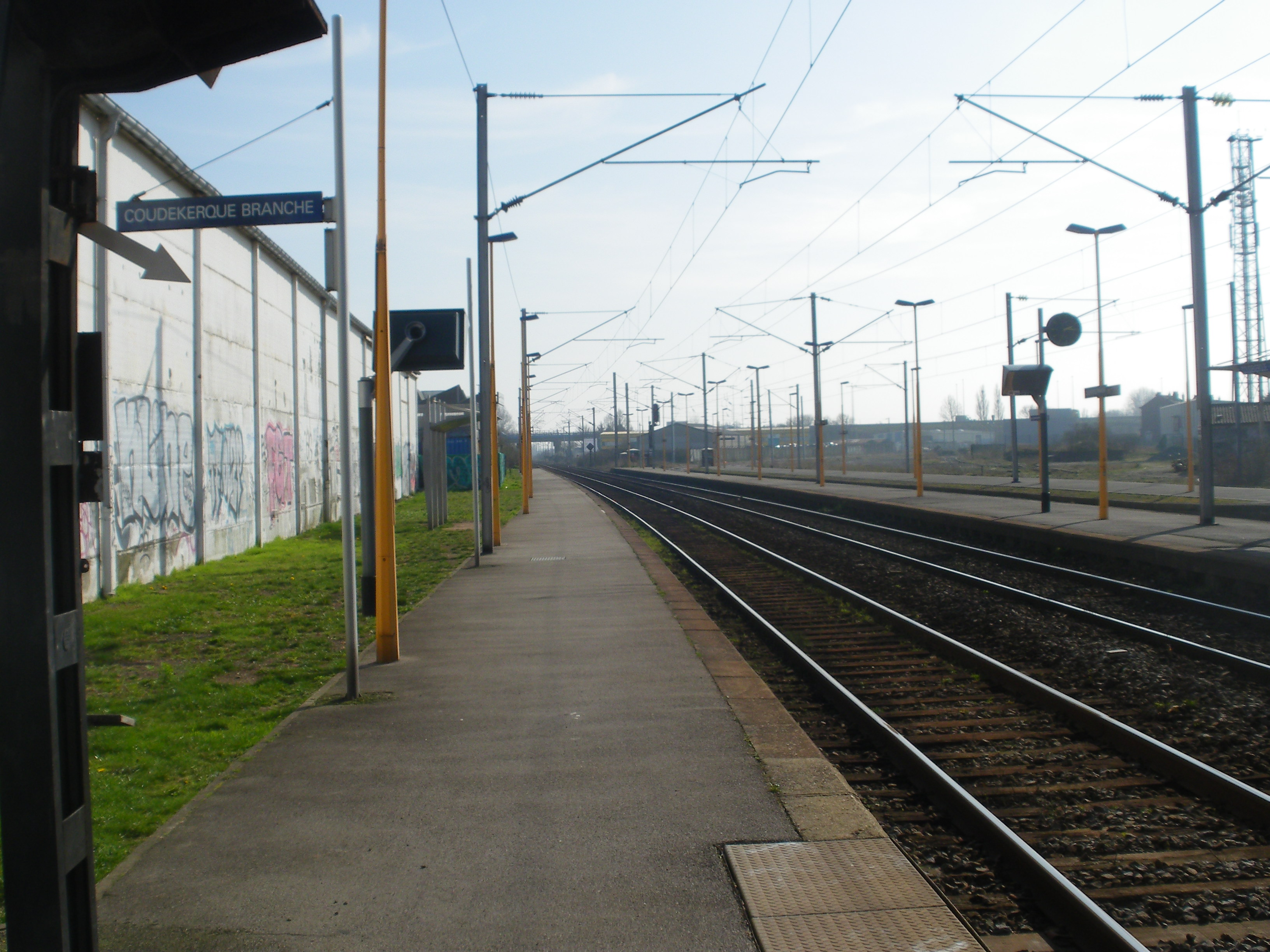 Vue des quais et des voies de la gare de Coudekerque-Branche.